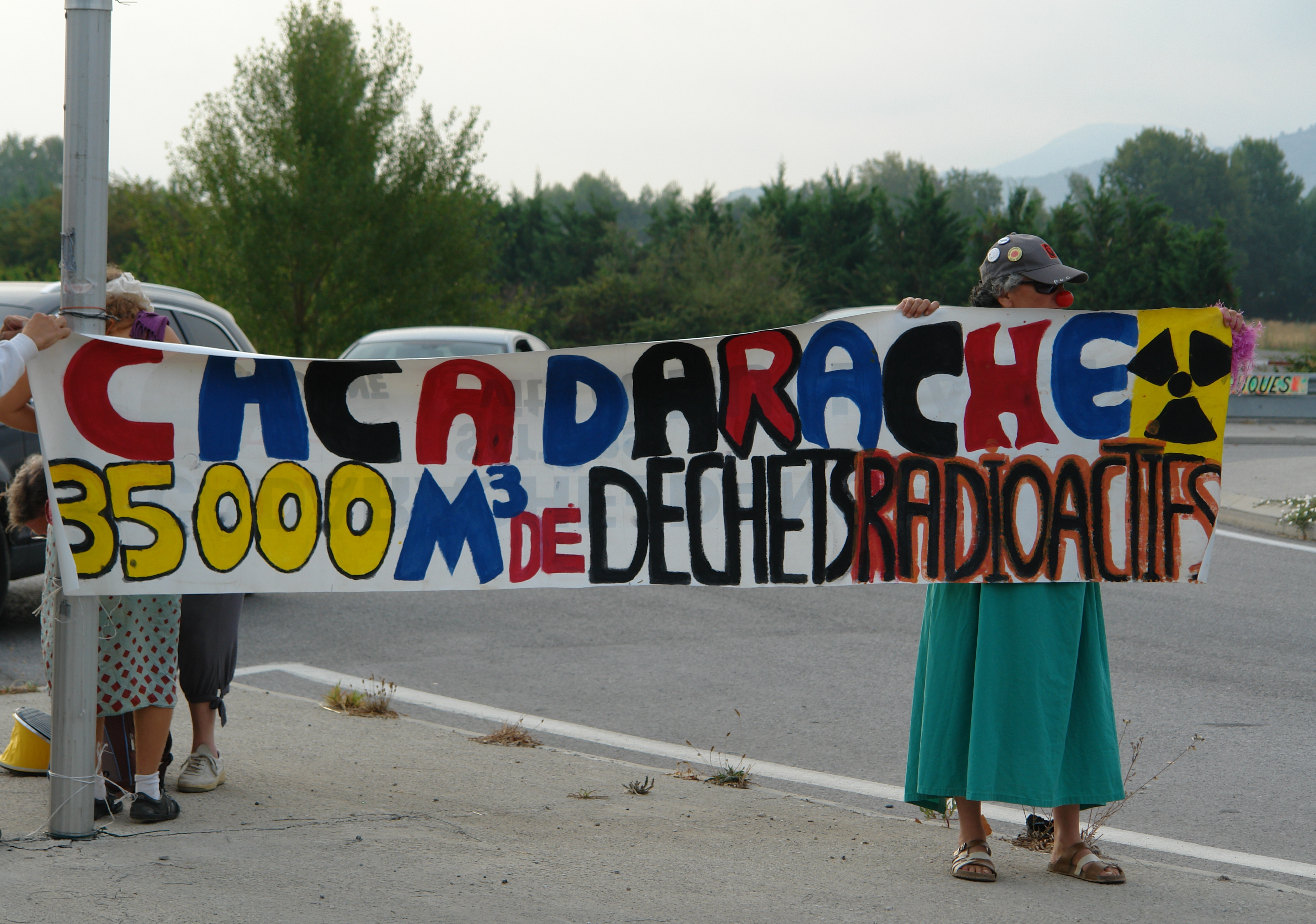 Caca-darache, 35 000 m3 de déchets radioactifs.